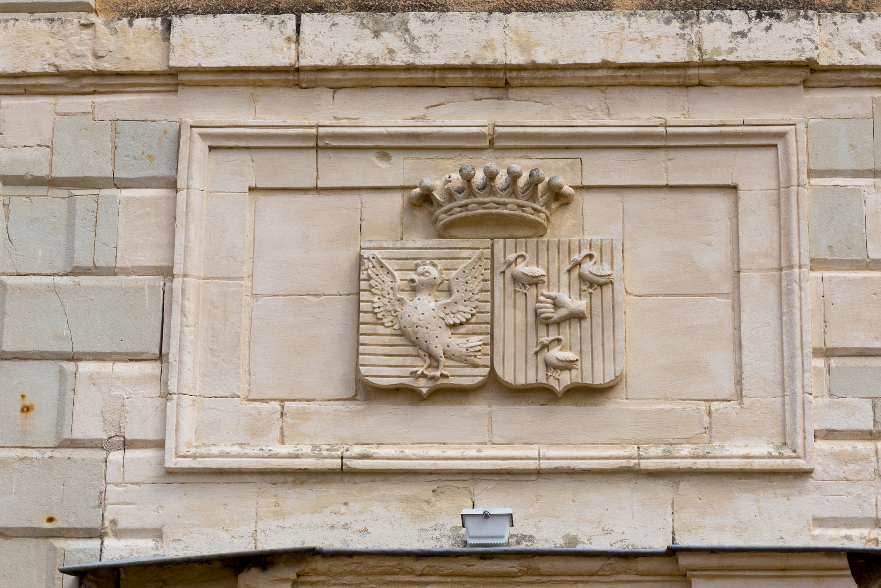 Le château du Boschet à Bourg-des-Comptes : blason sur l'entrée ouest. À gauche : blason de la famille Legeard de La Diriays « D'azur à une poule essorante d'or », à droite : blason de la famille Crespel « De gueules à une main fermée d'argent, accompagné de trois cygnes de même ».